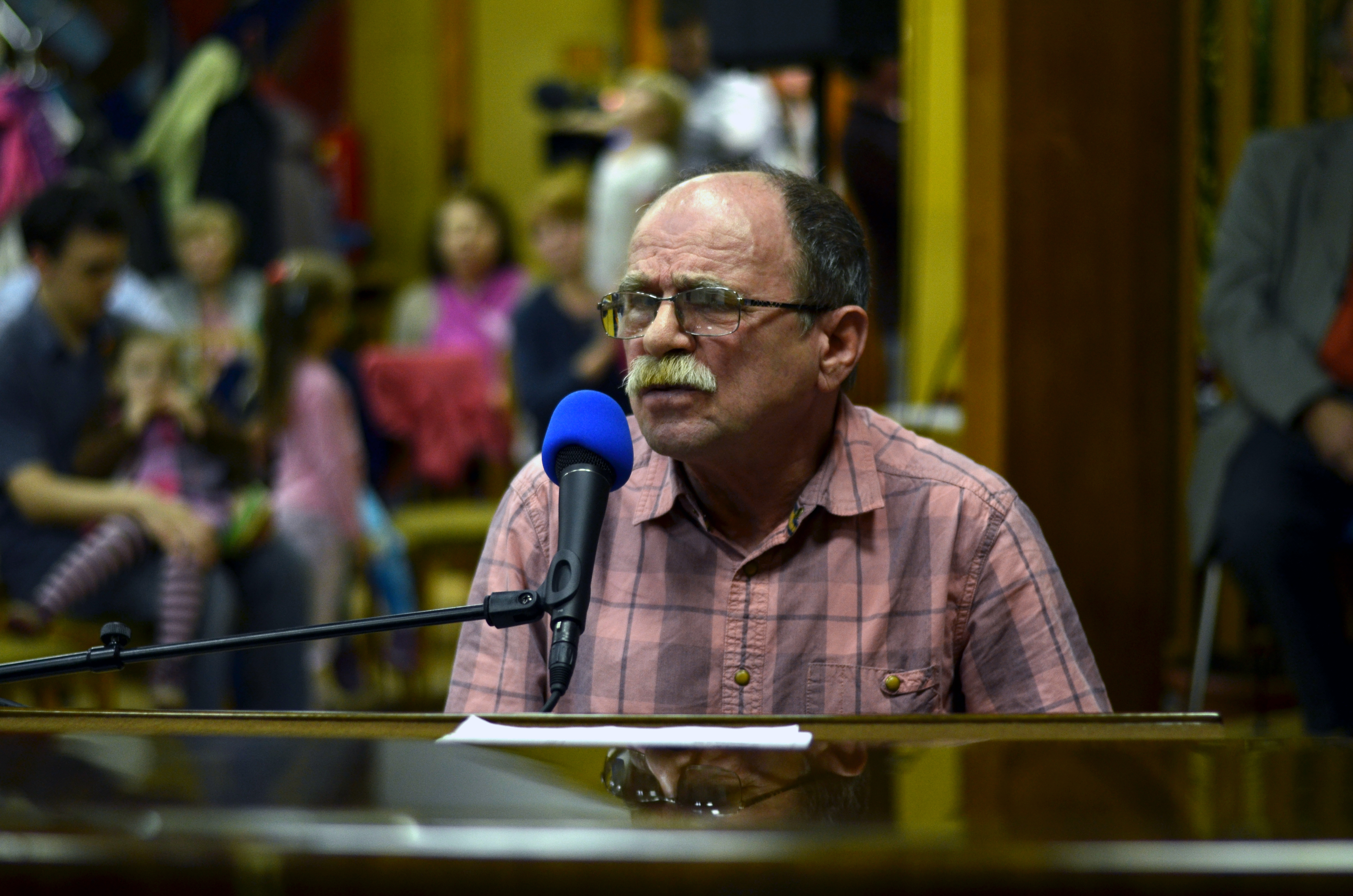 Jaroslav Uhlíř na písničkovém recitálu v Adamově